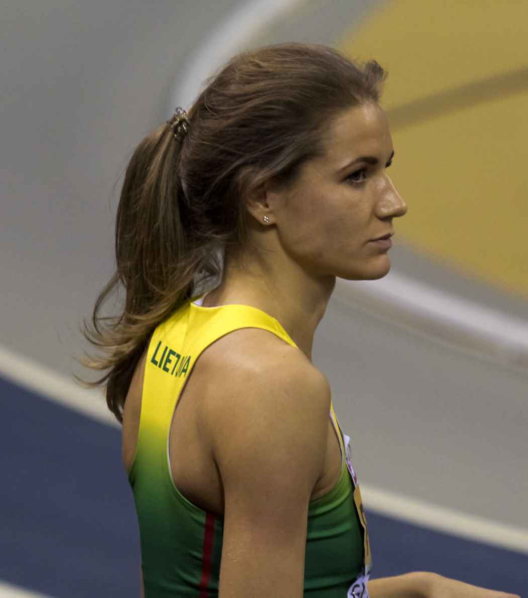 EKI30542 sames hoog palsyte